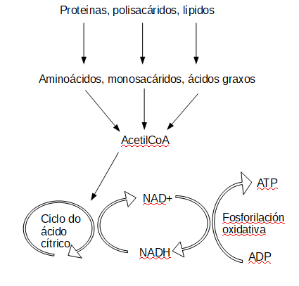 Esquema xeral do catabolismo, no cal se degradan e forman moléculas complexas con liberación de enerxía.